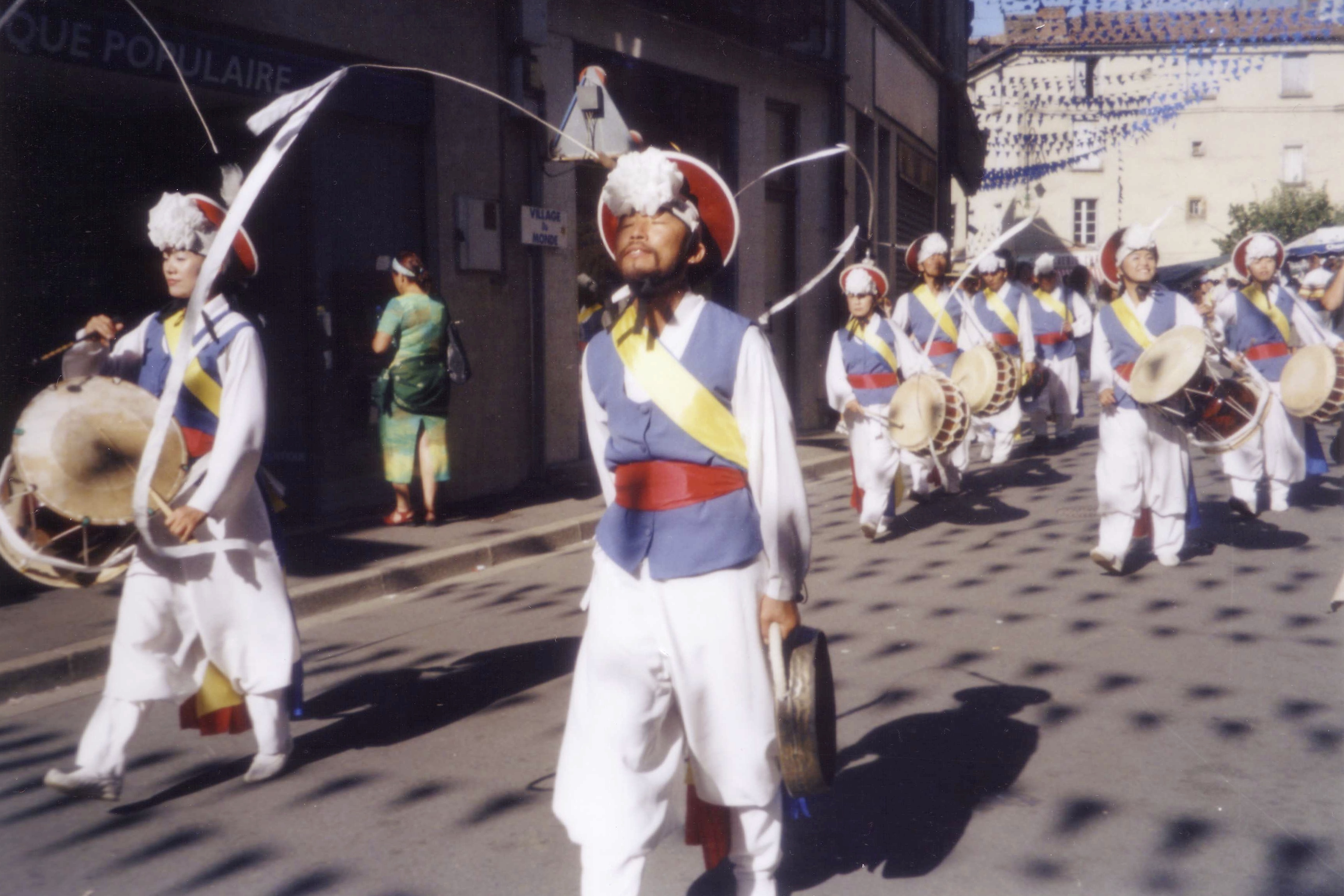 Festival de Confolens 2005 - danse des pêcheurs, la troupe Namsadang Baudeogi Pungmul d’Anseong, Corée du Sud